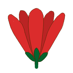 Morfología del perianto. Fusión: perianto dialisépalo y dialipétalo. Según Simpson (2005) Plant Systematics.